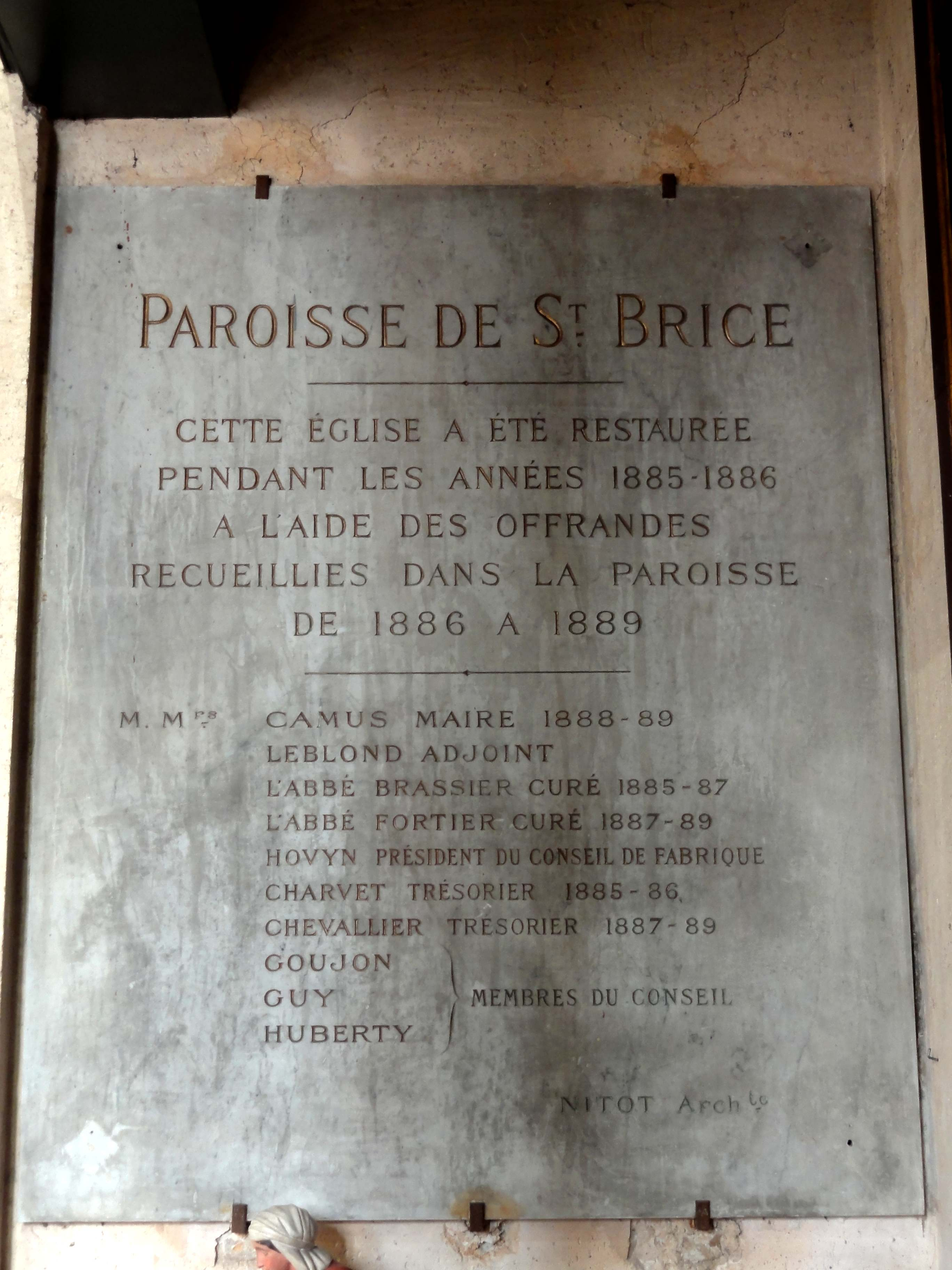 Plaque commémorative de la réparation de l'église en 1885-86.